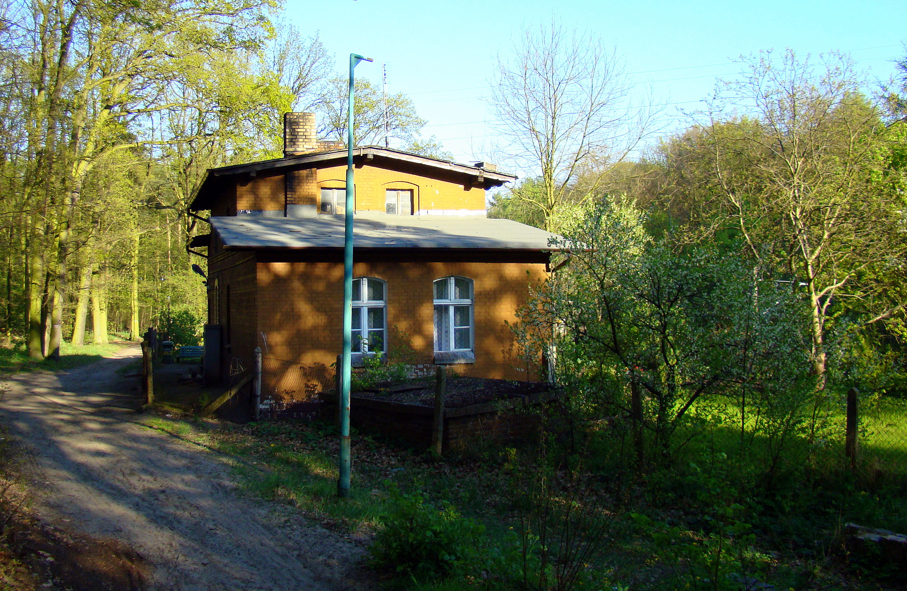 Szczecin Mścięcino, budynek dworca (nieczynny), (Szczecin, Województwo zachodniopomorskie), Polska